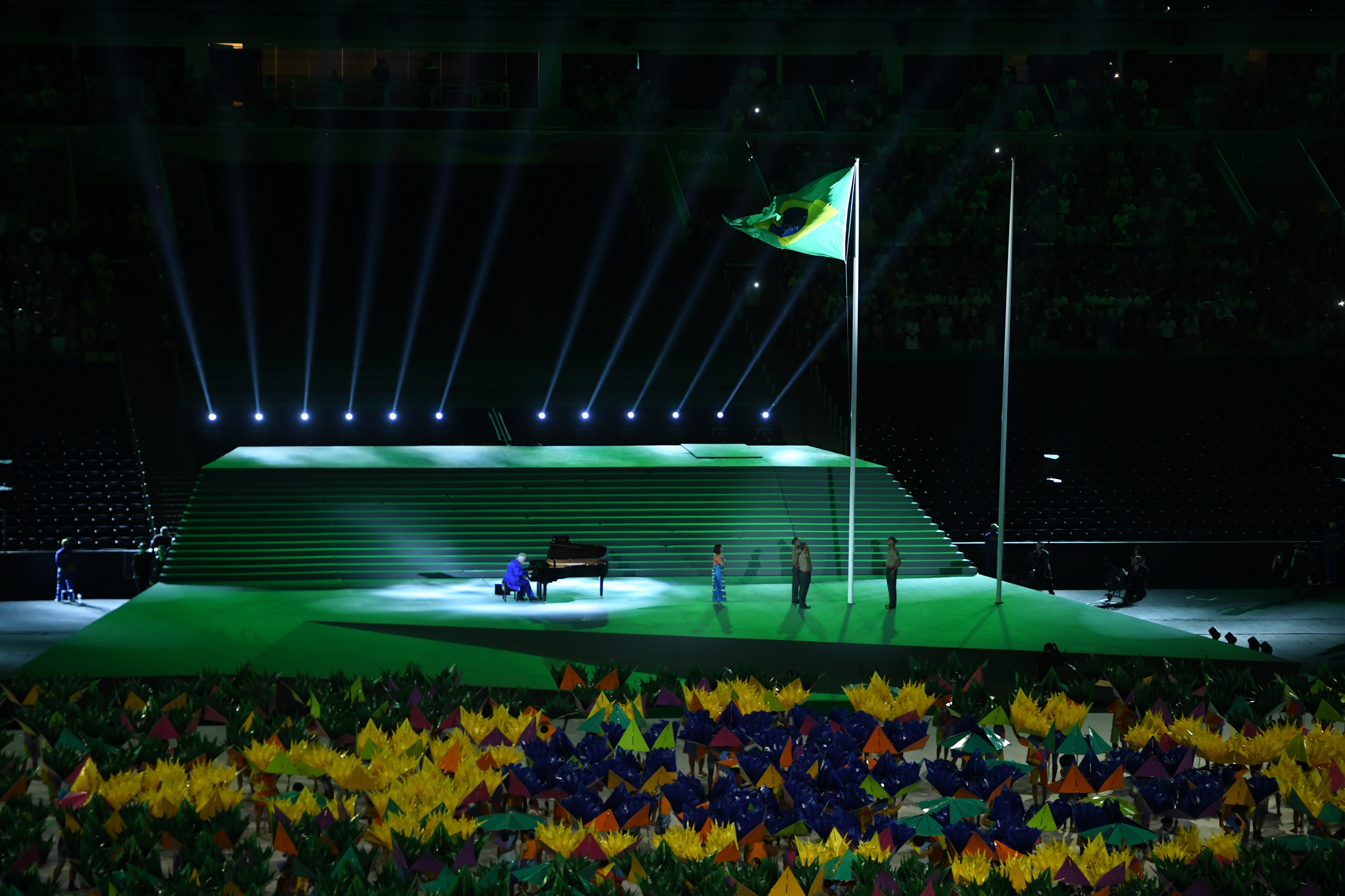 Rio de Janeiro - Cerimônia de abertura dos Jogos Paralímpicos Rio 2016 no Estádio do Maracanã